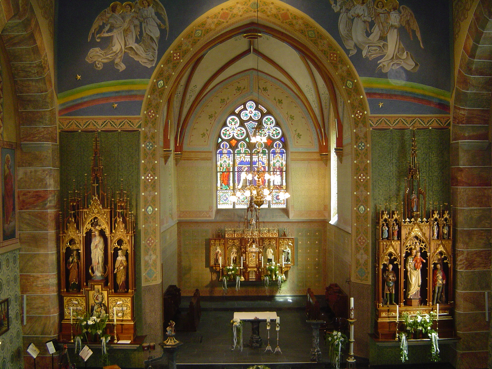 Selbst fotografiert, Lizenz: GNU-FDL